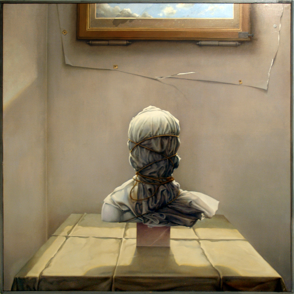 Theodor Pištěk, Autoportrét u okna II, olej na plátně, 1981